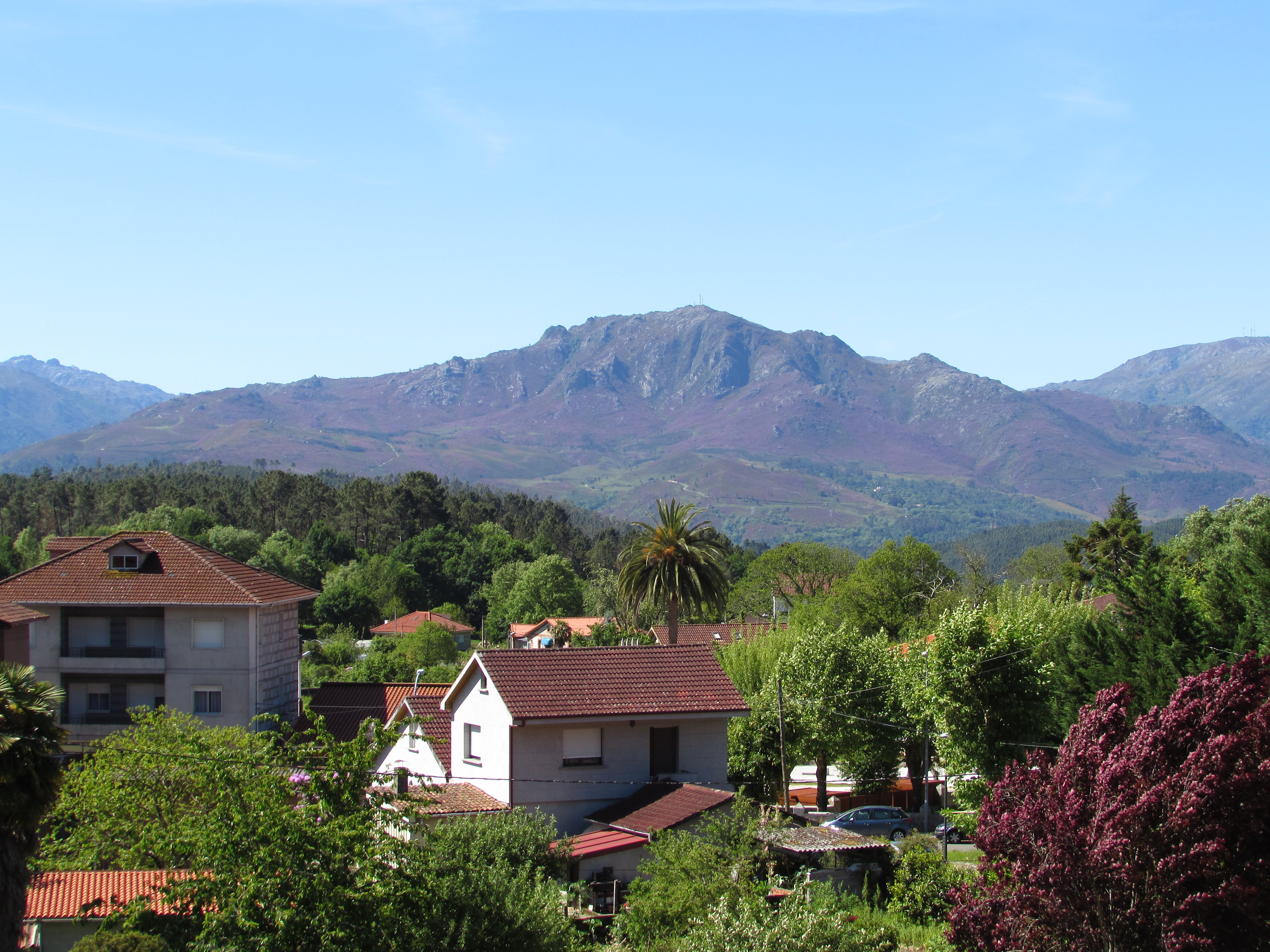 Vista do Coto de Santa Eufemia desde Entrimo.